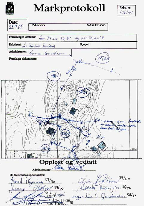 Kartforretning: Markprotokoll.